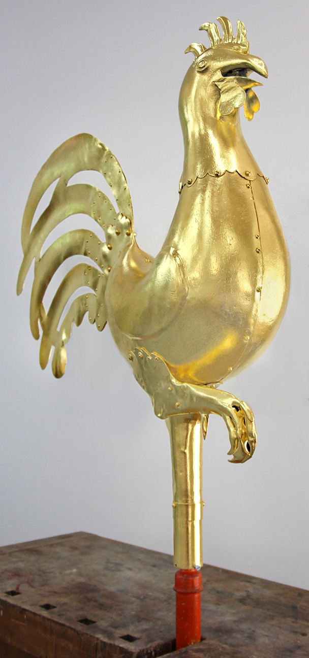 Wetterhahn des Mainzer Doms, "Domsgickel" im Frühjahr 2013 zu Restauration und Neuvergoldung